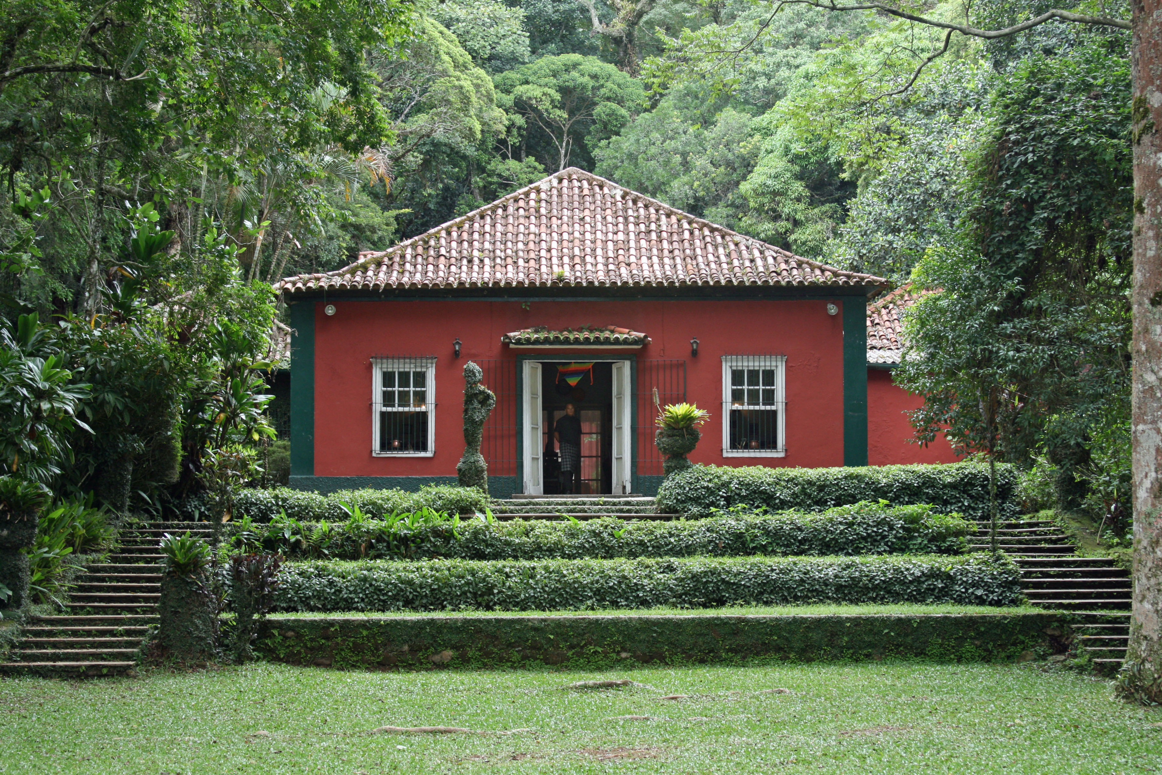 Antiga residência do Barão de Escragnolle e depois de todos os administradores da Floresta da Tijuca. Atual Restaurante Os Esquilos.